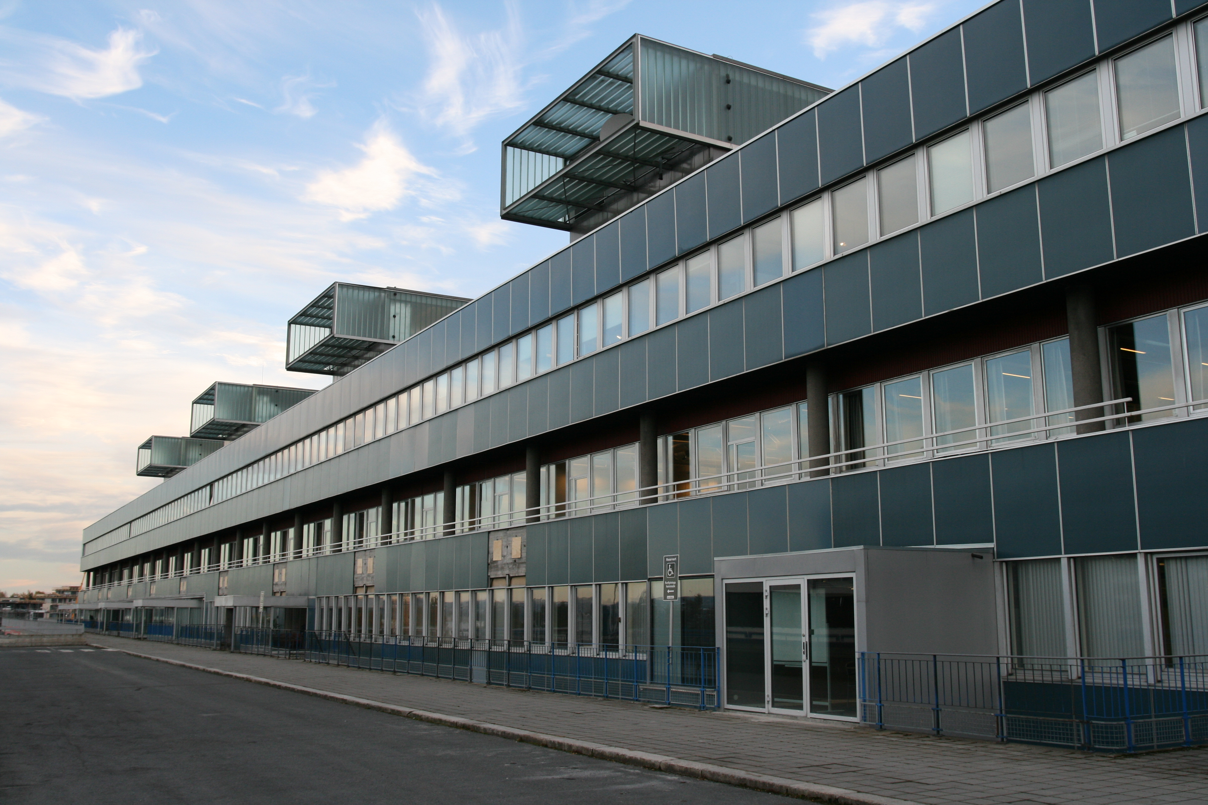 IT Fornebu, utvendig.